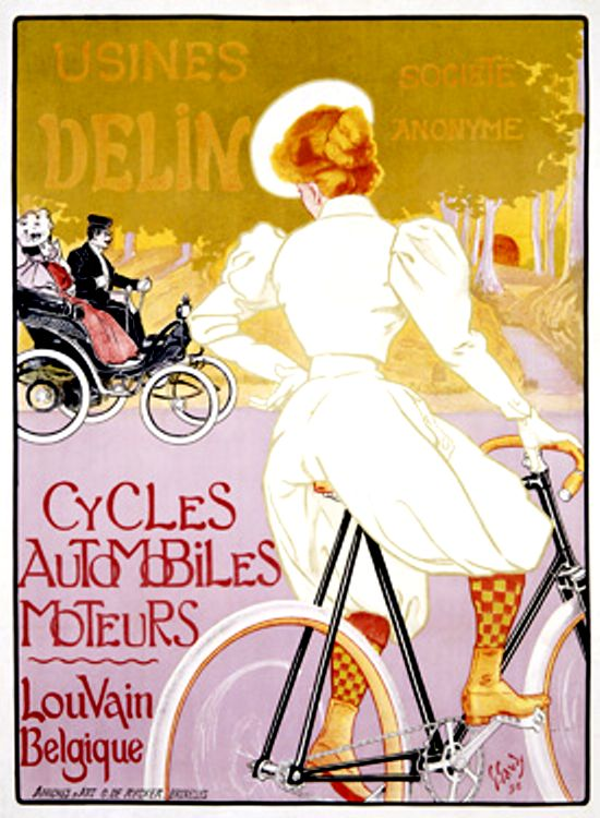 Poster "Cycles Automobiles Moteurs Louvain Belgique"